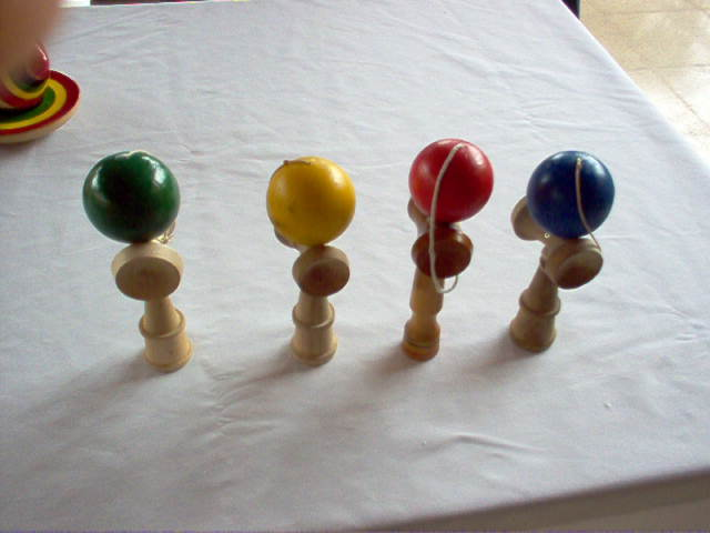 Foto de cuatro kendama. Tomada por mí mismo en una feria japonesa en mi universidad